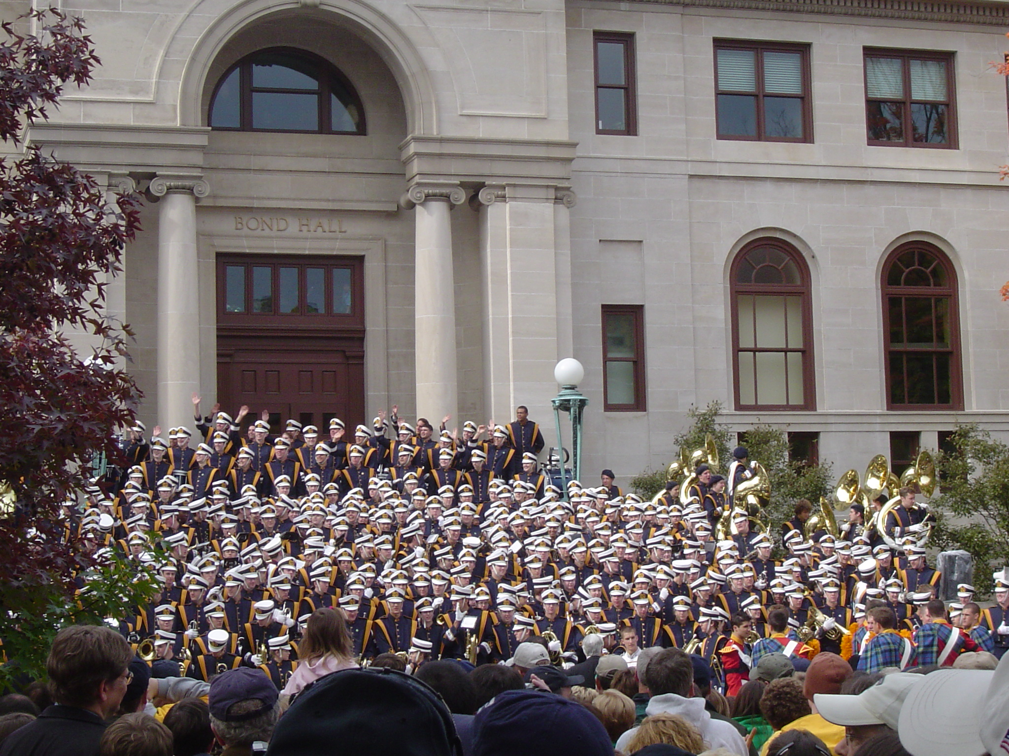 la fanfare de notre dame à la sortie de la messe précédent un match de son équipe de football américain